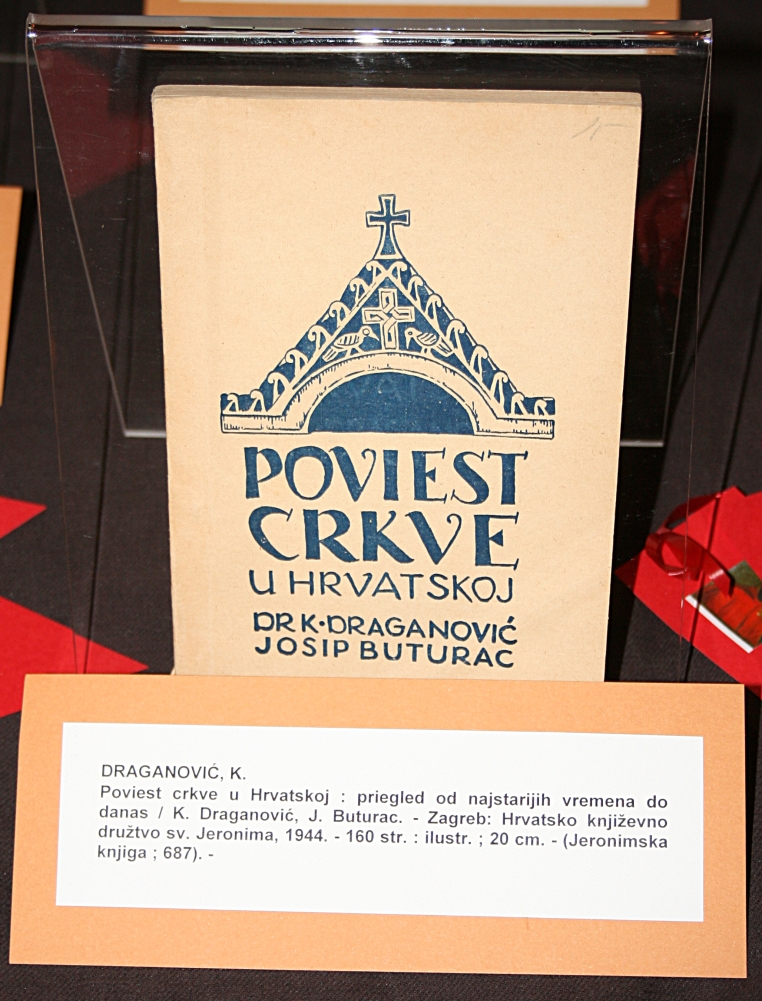 Dobrotvorni koncert "Križ nek' ti sačuva ime" u koncertnoj dvorani Vatroslav Lisinski u Zagrebu.